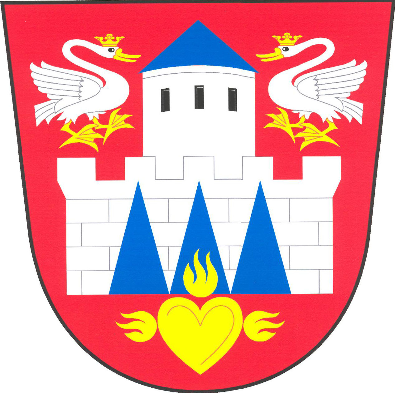 Znak obce Ctiboř (okres Tachov)